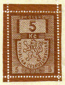 In London gefälschte 5 Koruna-Steuermarke, ca. 1939